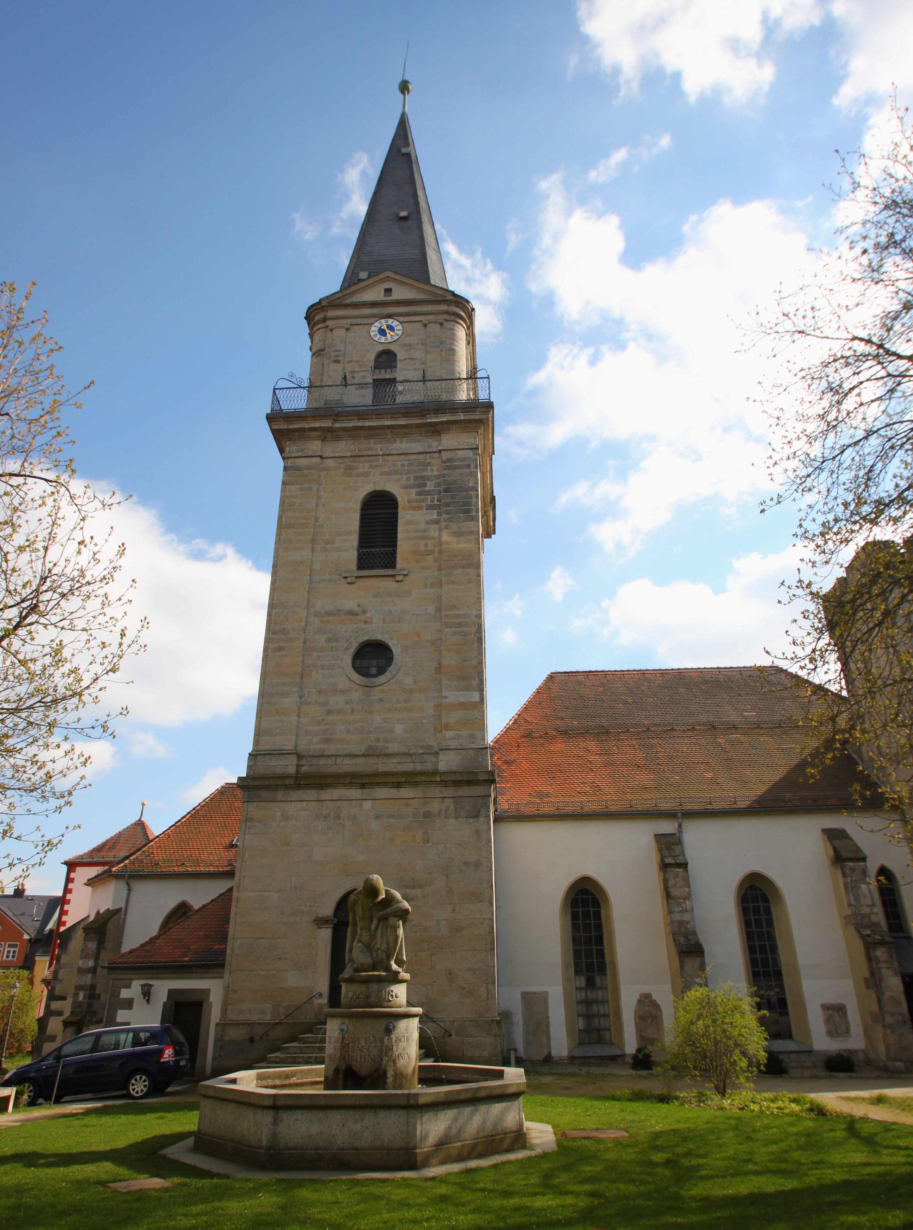 Evangelisch-lutherische Pfarrkirche St. Bartholomäus, Pfarrhof 1, Marktredwitz